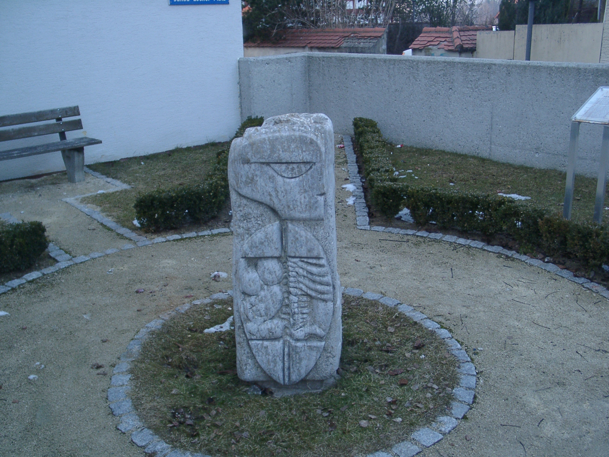 Narrenschiff-Denkmal auf dem Jakob-Locher-Platz, entstanden 2002 im Rahmen eines Bildhauer-Symposiums, gefertigt von dessen Organisator Horst Reichle (Biberach), aufgestellt in Ehingen a.d.Donau.